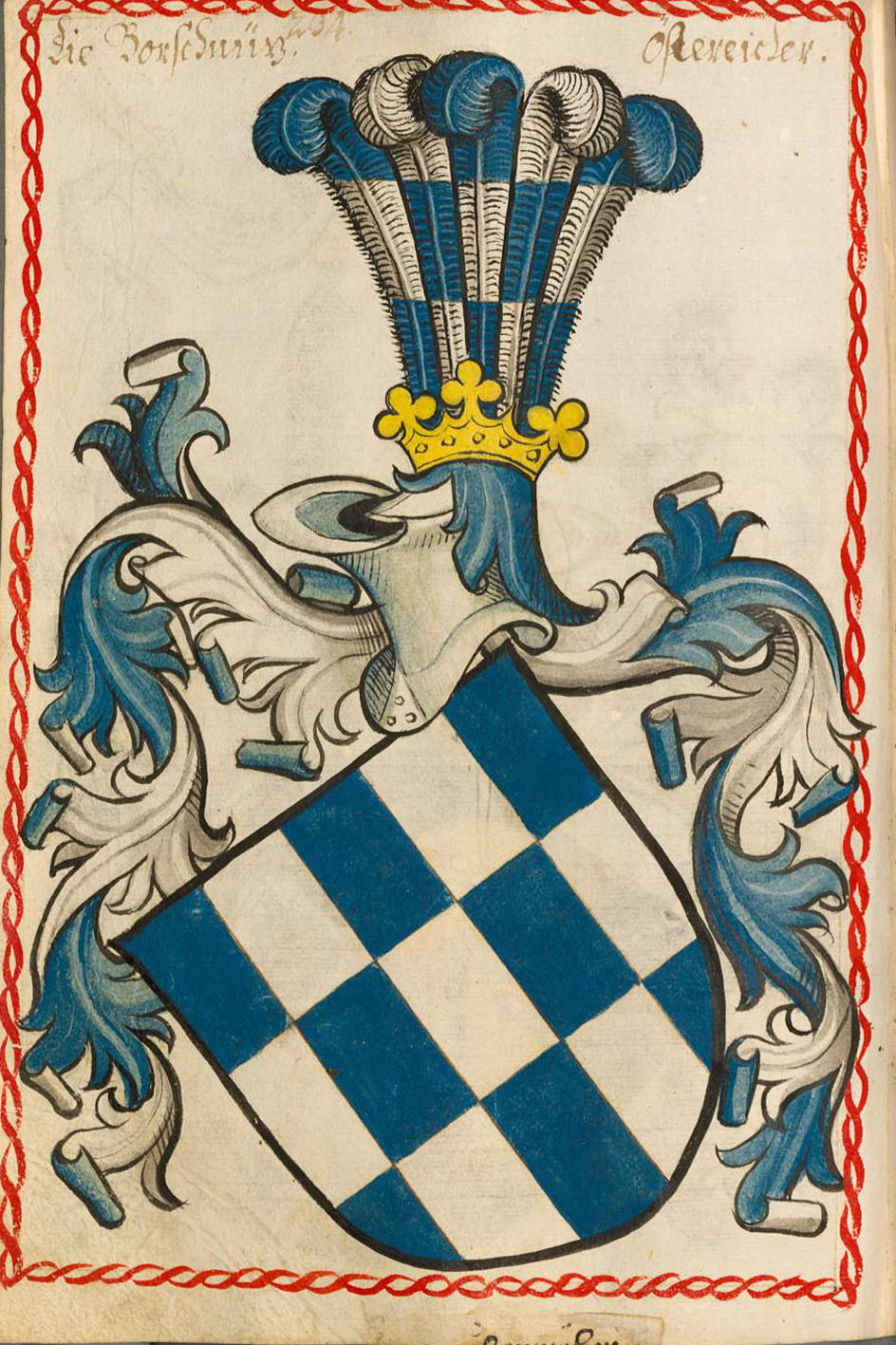 Scheibler'sches Wappenbuch , älterer Teil Österreicher Seite 234